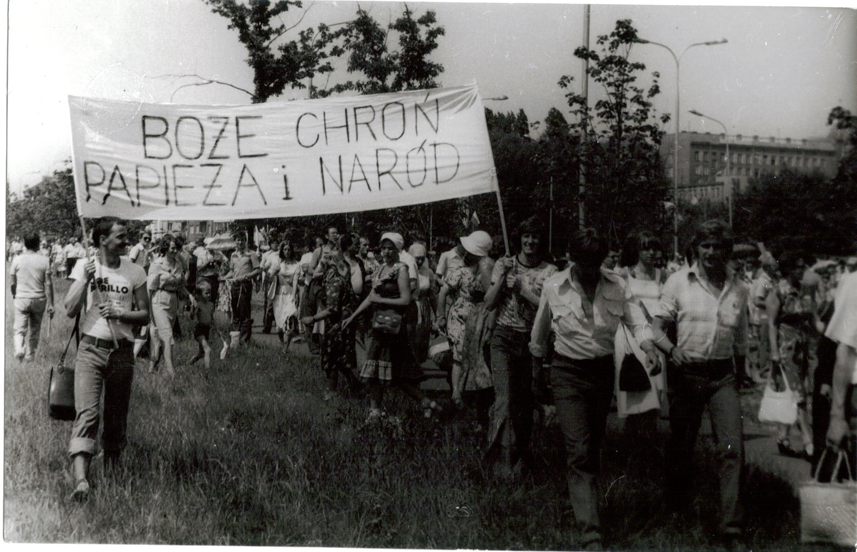 Ciszewski i Mickiewicz 06 1989